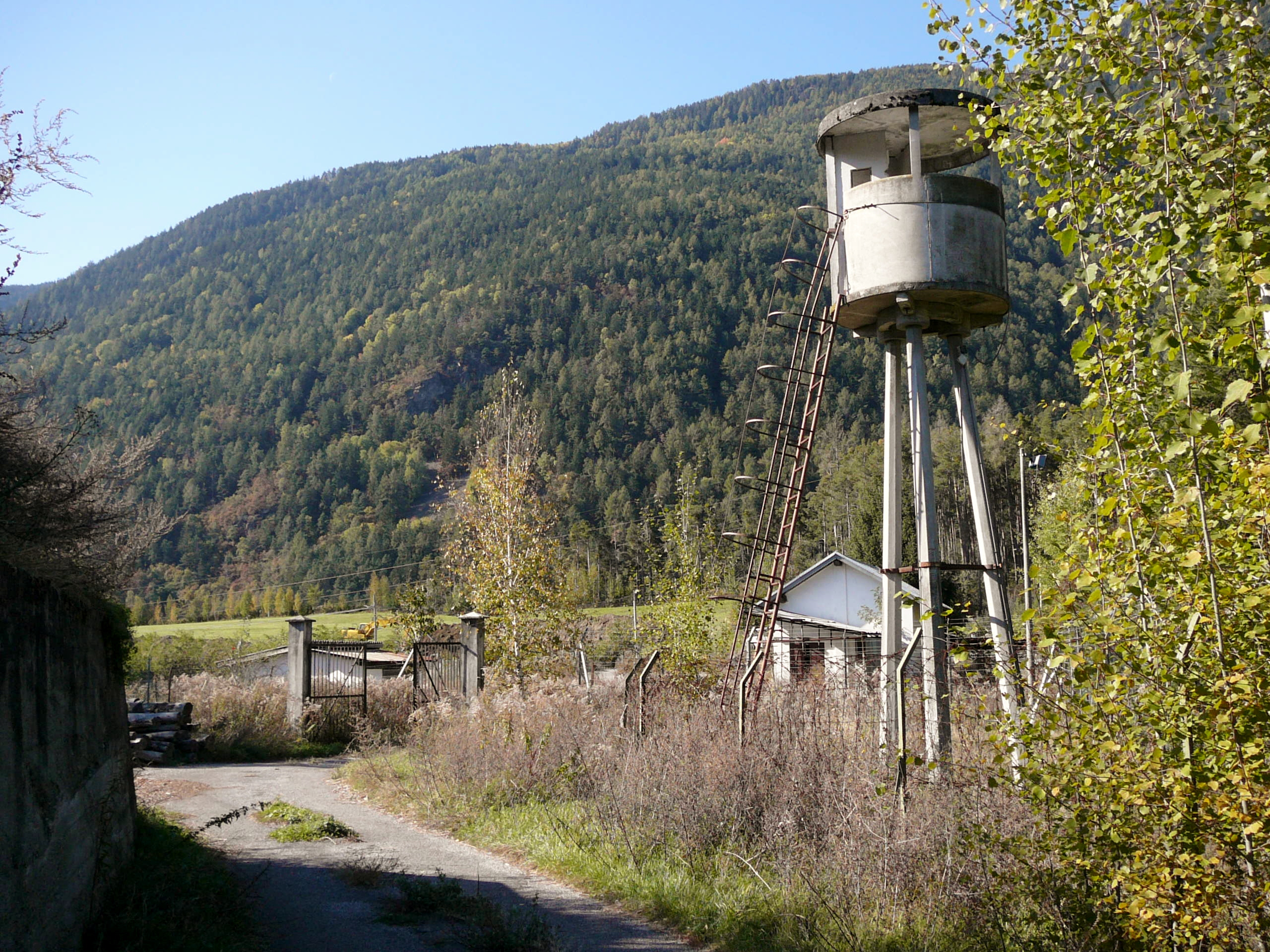 Ex-poveriera Riva di Sotto (Varna)